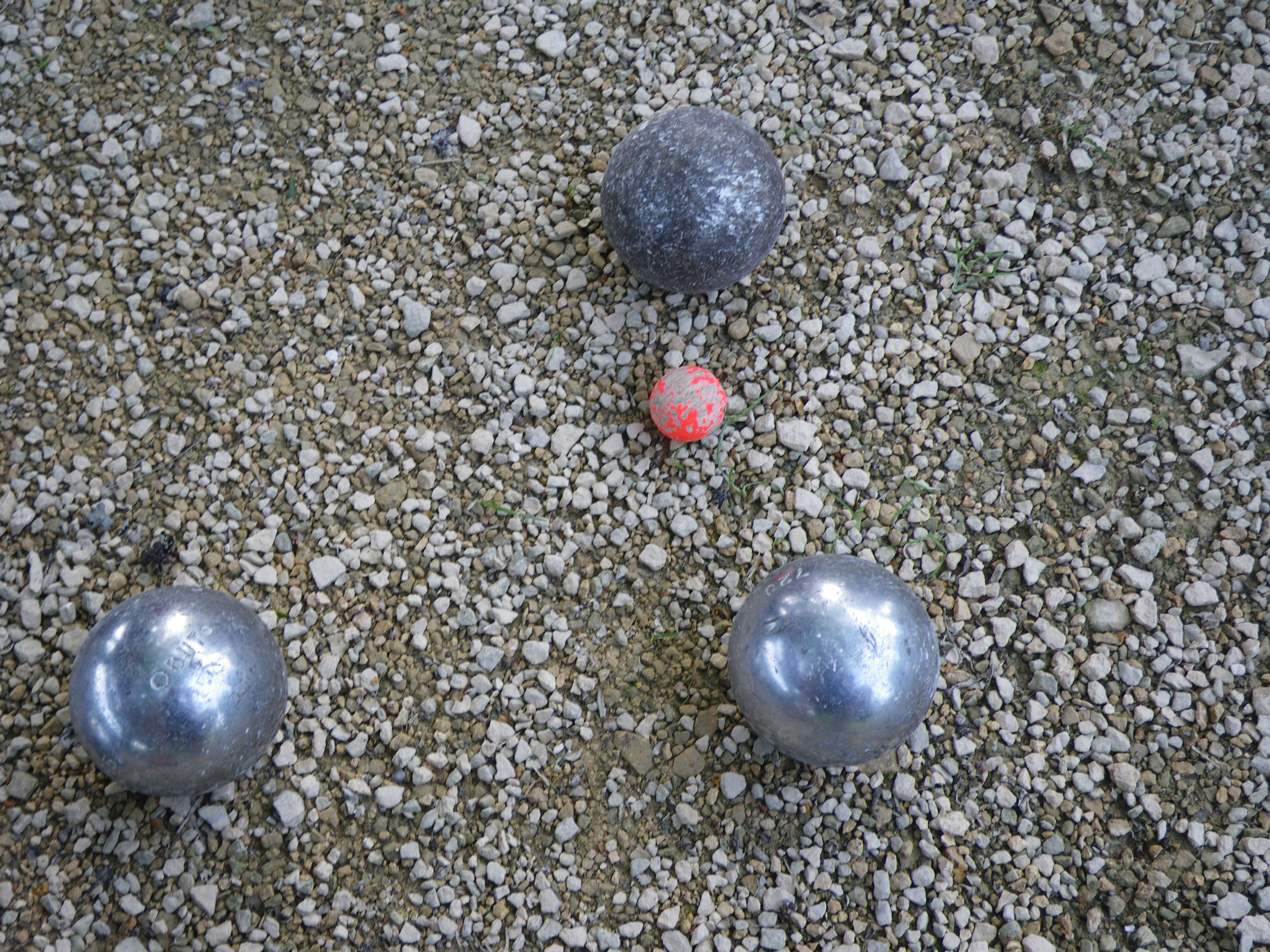 Pétanque : jeu serré